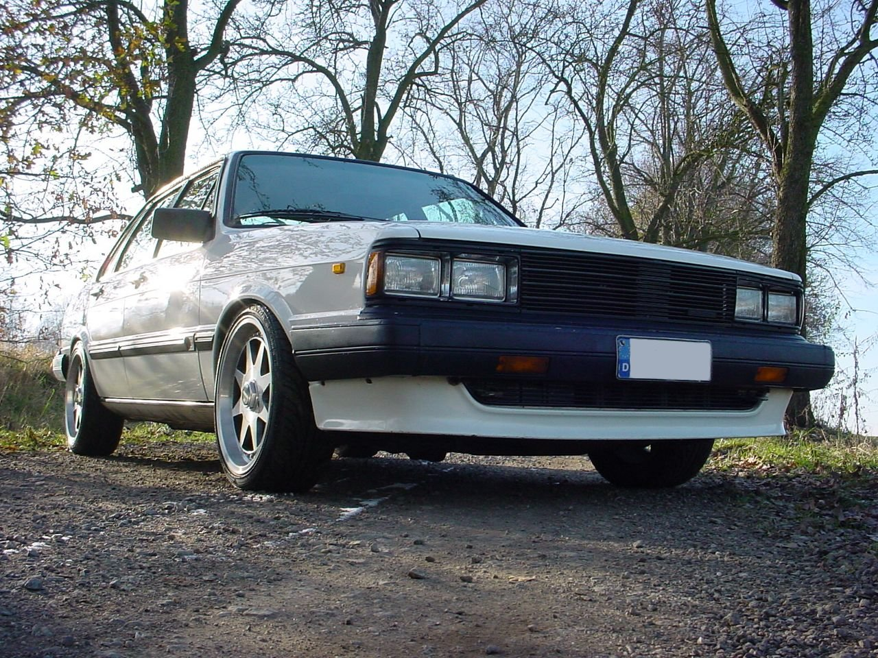 Audi 4000 S quattro, frontview in autumn